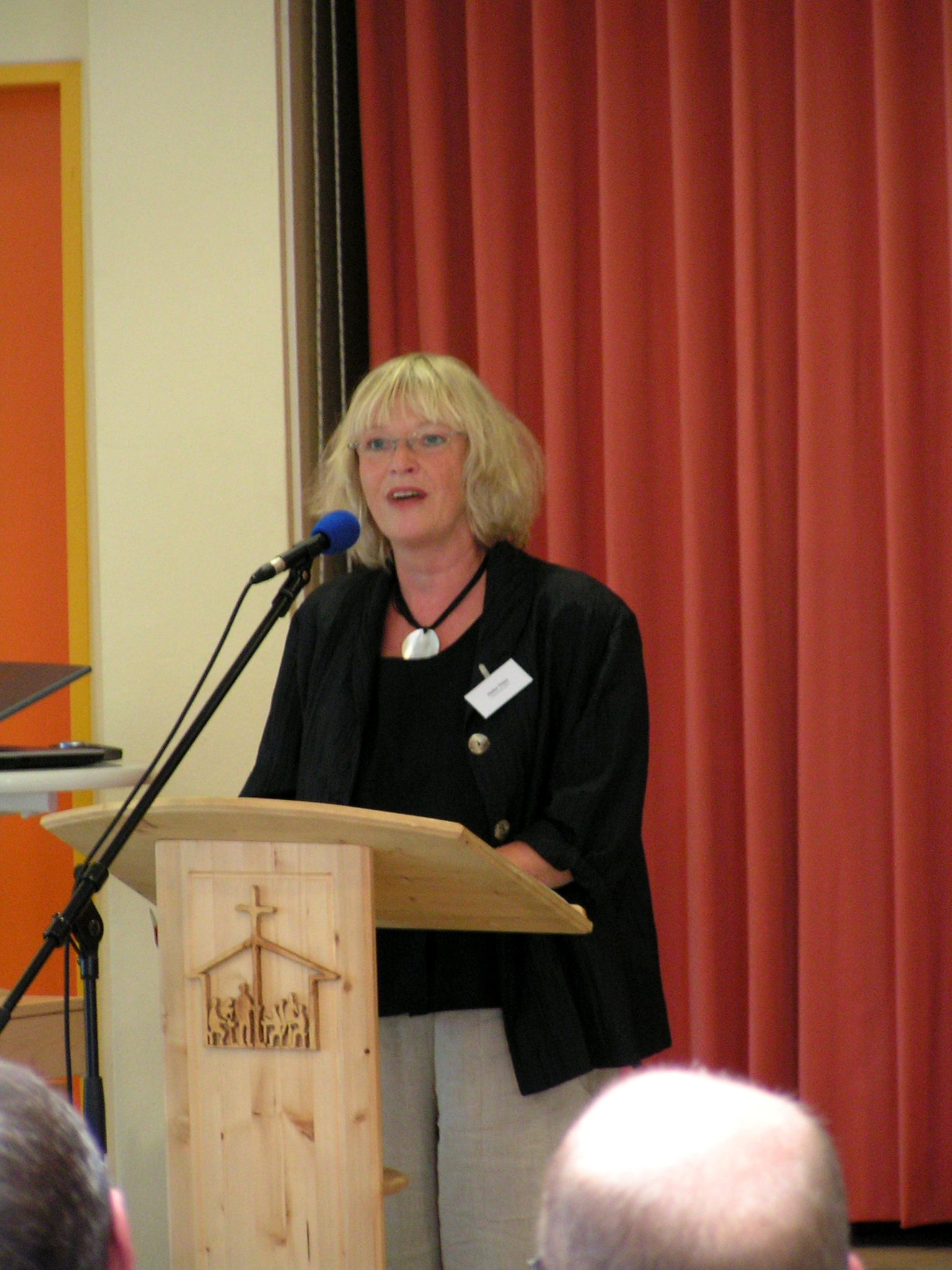 Die Vorsitzende der AGFS Nds., Heike Thies, am 22. September 2006 auf der Jahrestagung der Arbeitsgemeinschaft in den Räumen der FCSO